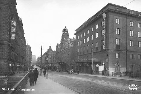 Biograf Palladium, Kungsgatan 65